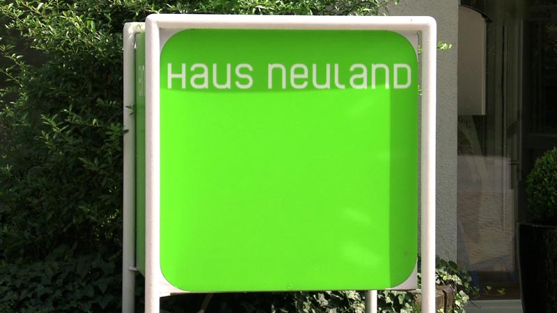 Der grüne Kubus verweist auf den Eingang zu Haus Neuland.